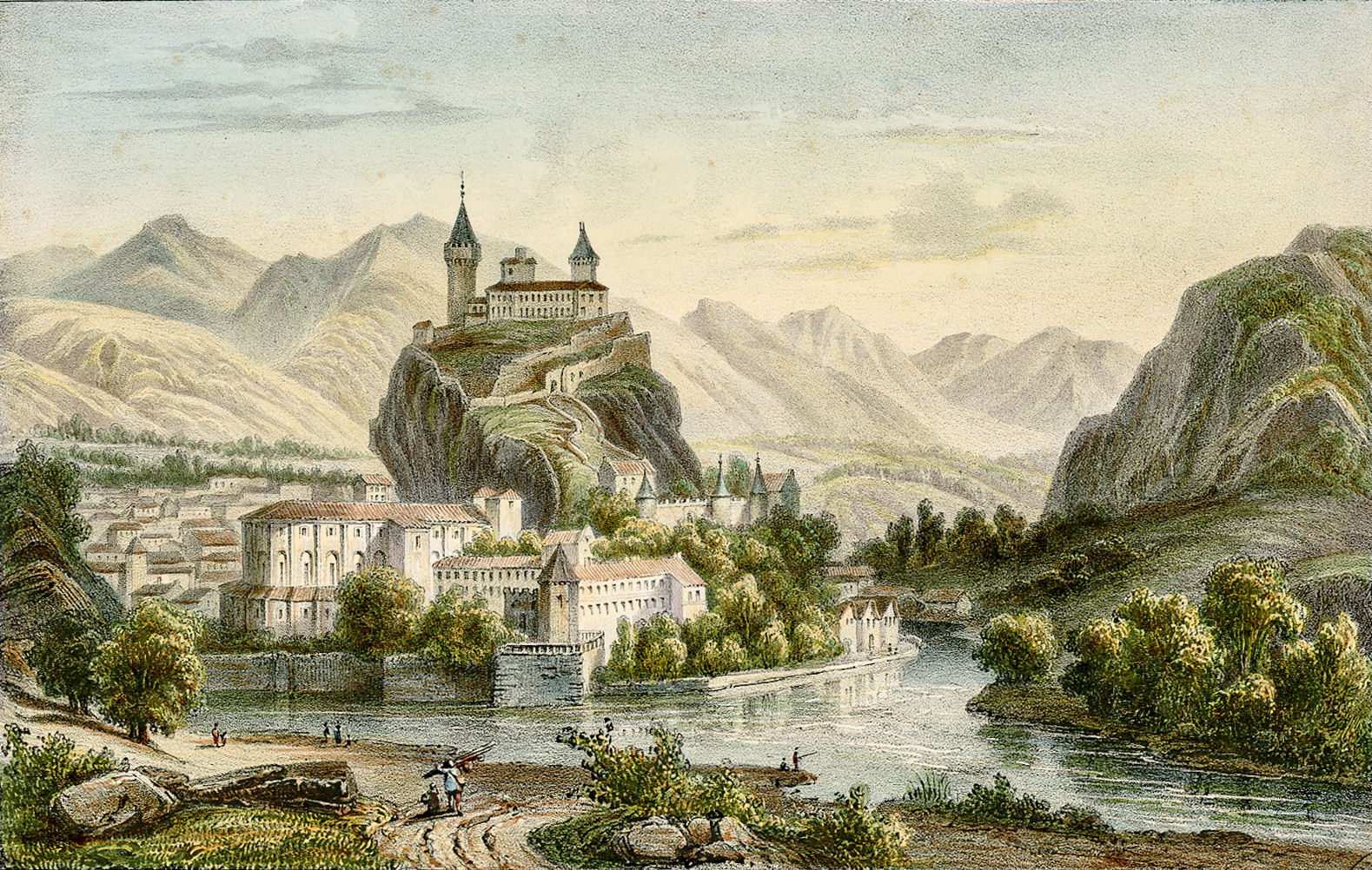 Ville de Foix, lithographie par Edouard Hostein